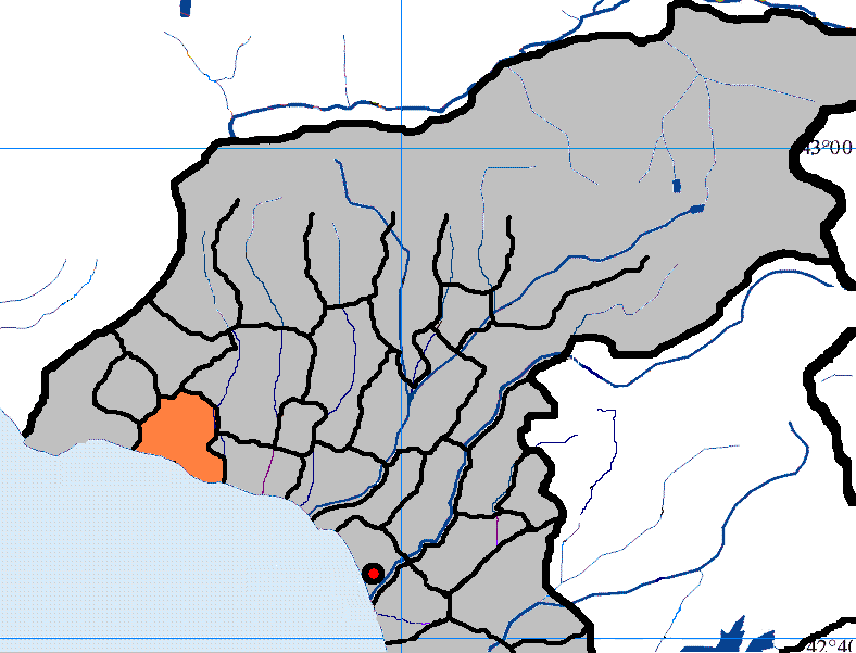 село Кындыг в Очамчирском районе